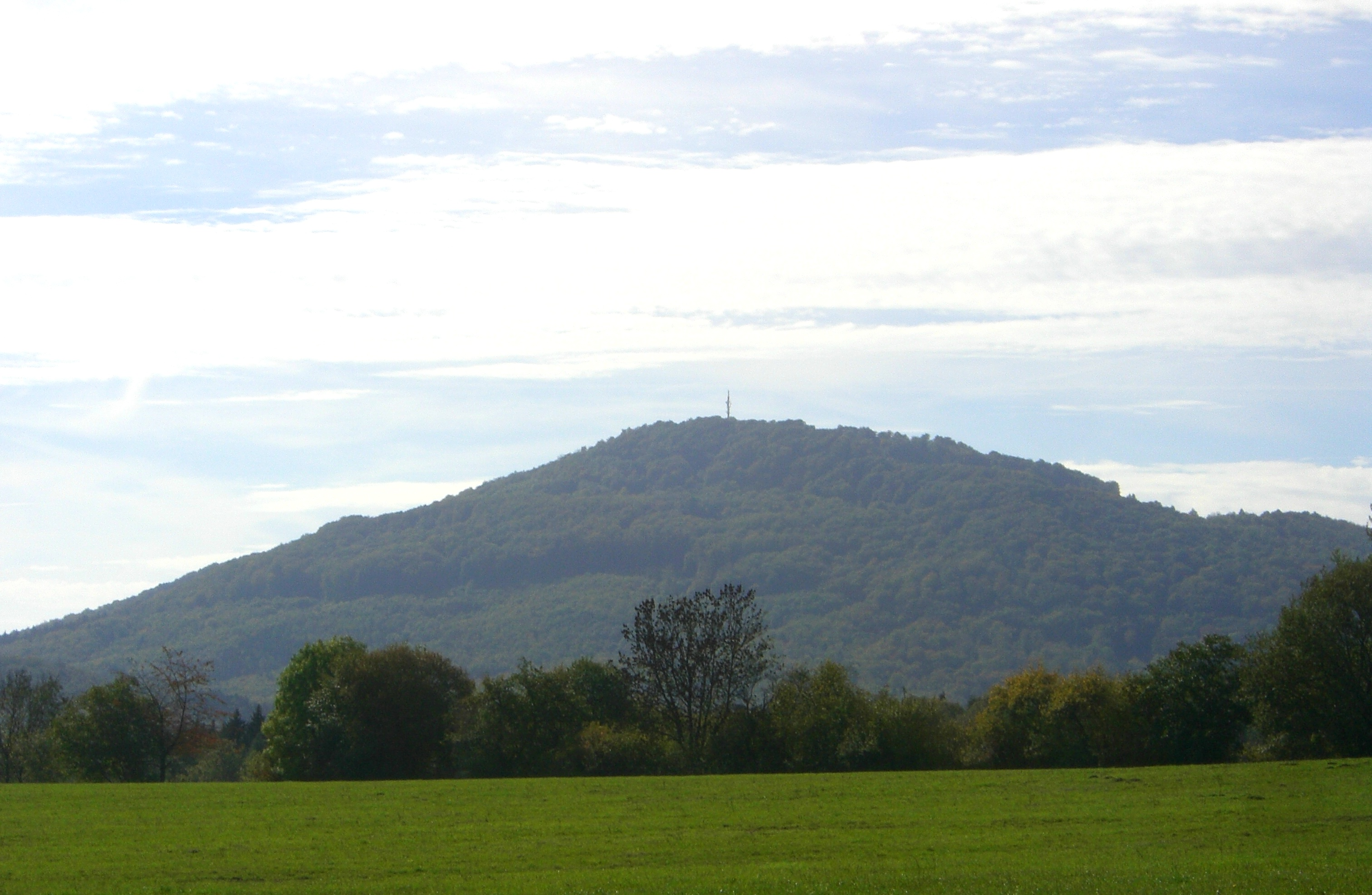 Großer Gleichberg aus Richtung Zeilfeld